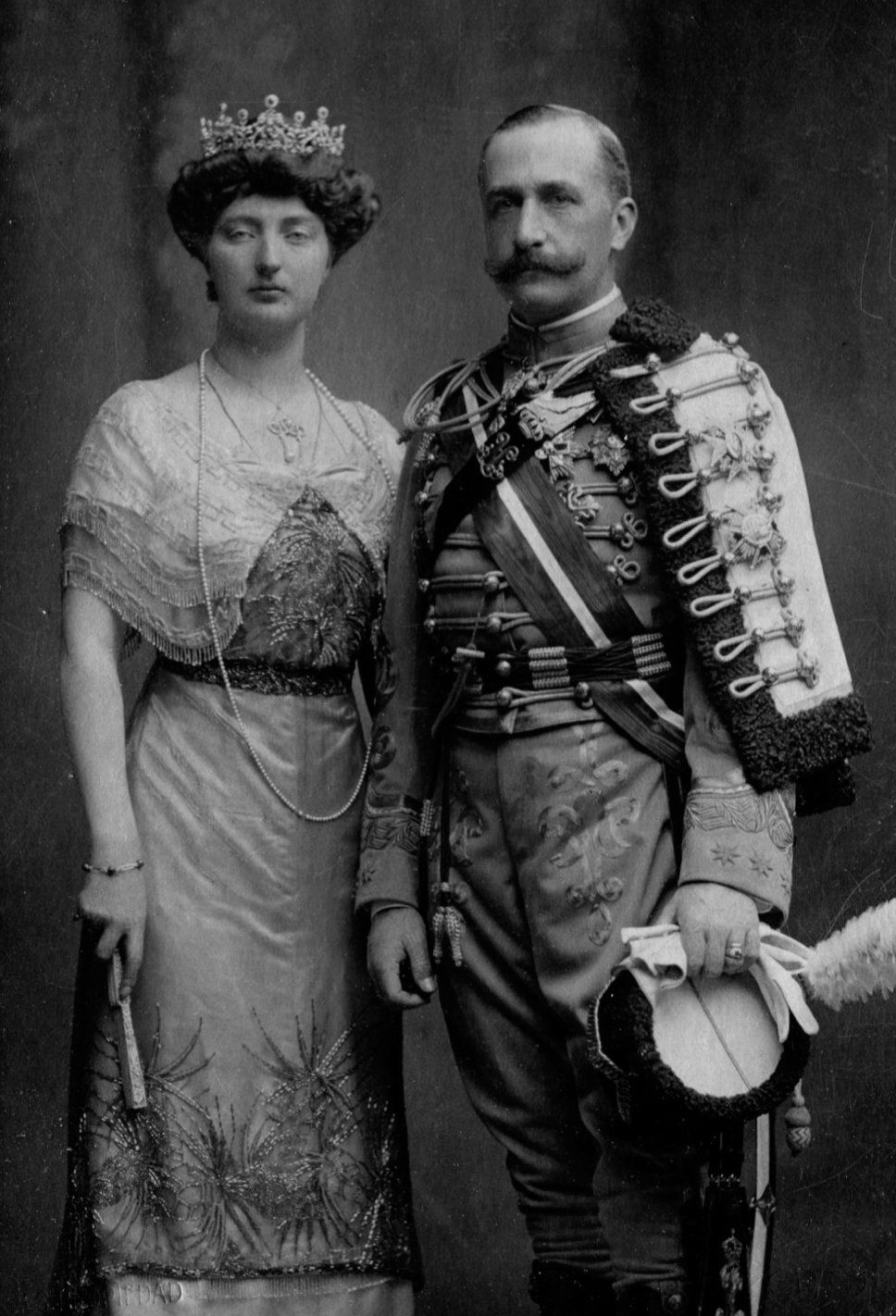 Retrato fotográfico de S.A.R. Carlos de Borbón-Dos Sicilias acompañado de su segunda mujer, María Luísa de Francia.